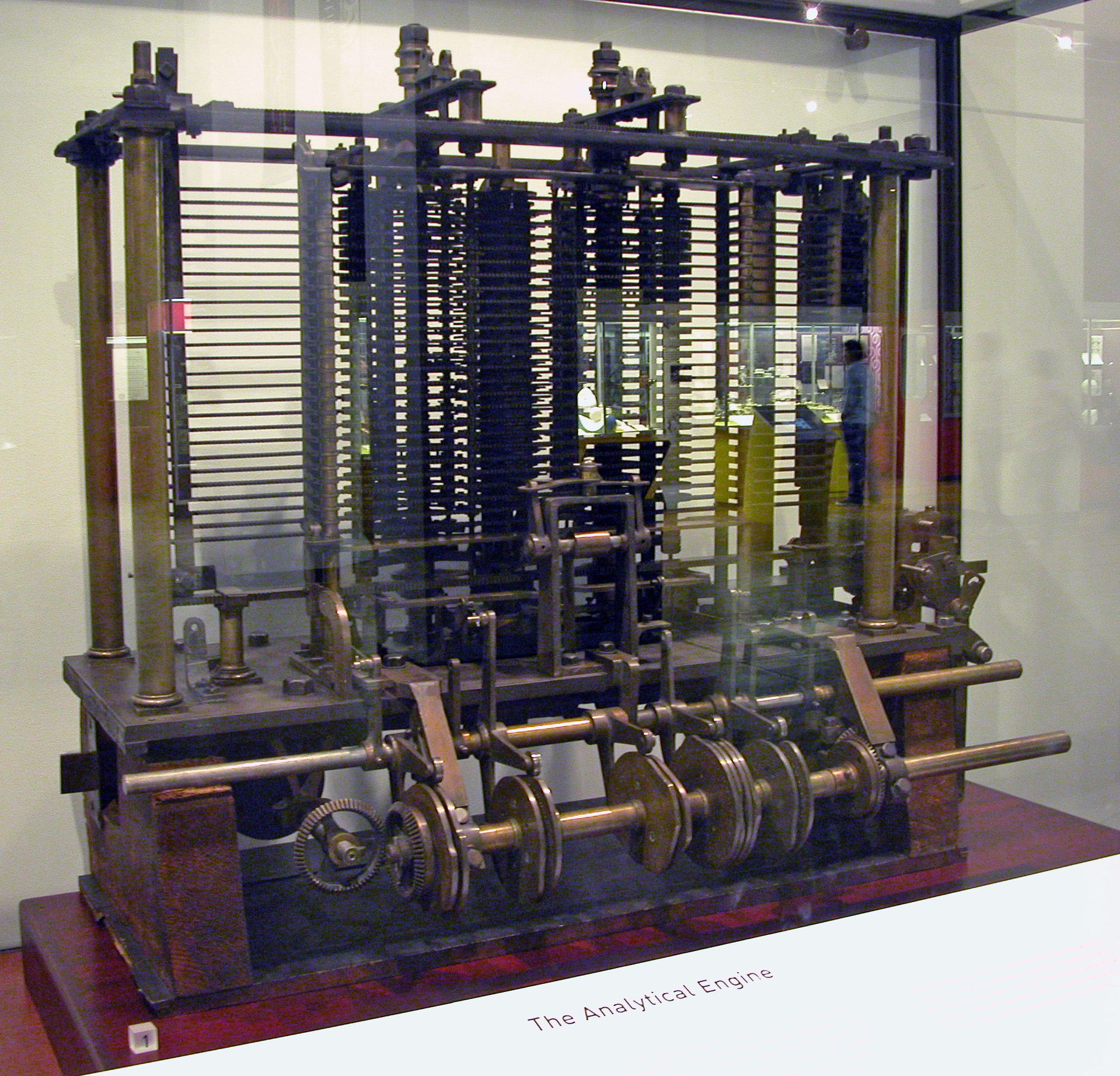 Machine Analytique de Charles Babbage, exposée au Science Museum de Londres (Mai 2009)